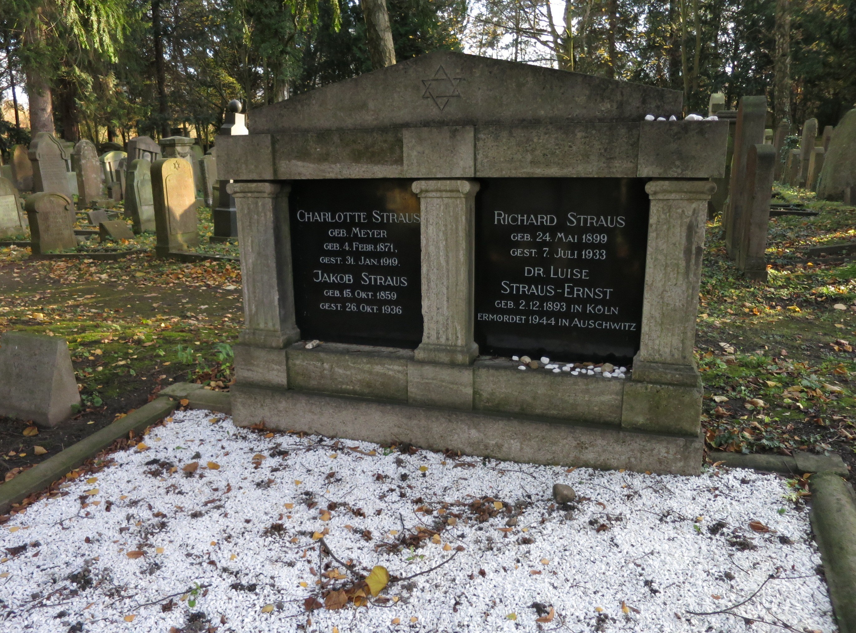 Luise Straus-Ernst - Erinnerungsvermerk auf dem Familiengrab im Jüdischen Friedhof Köln-Bocklemünd (Flur 8 Nr.1-3)